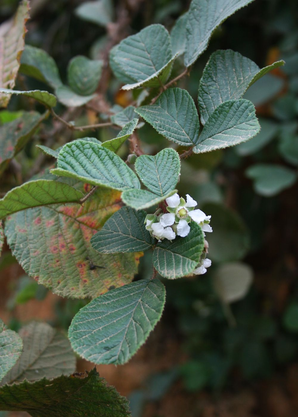 Rubus ellipticus var. obcordatus, Rosengewächse (Rosaceae) - Vietnam/Việt Nam: Dorf Cán Cấu nördlich von Bắc Hà (Prov. Lào Cai)